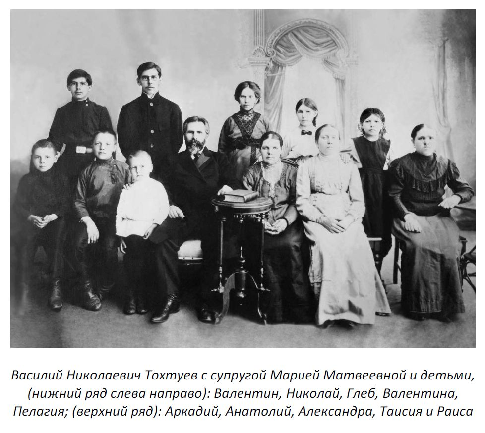 Семья депутата Первой государственной Думы Василия Николаевича Тохтуева